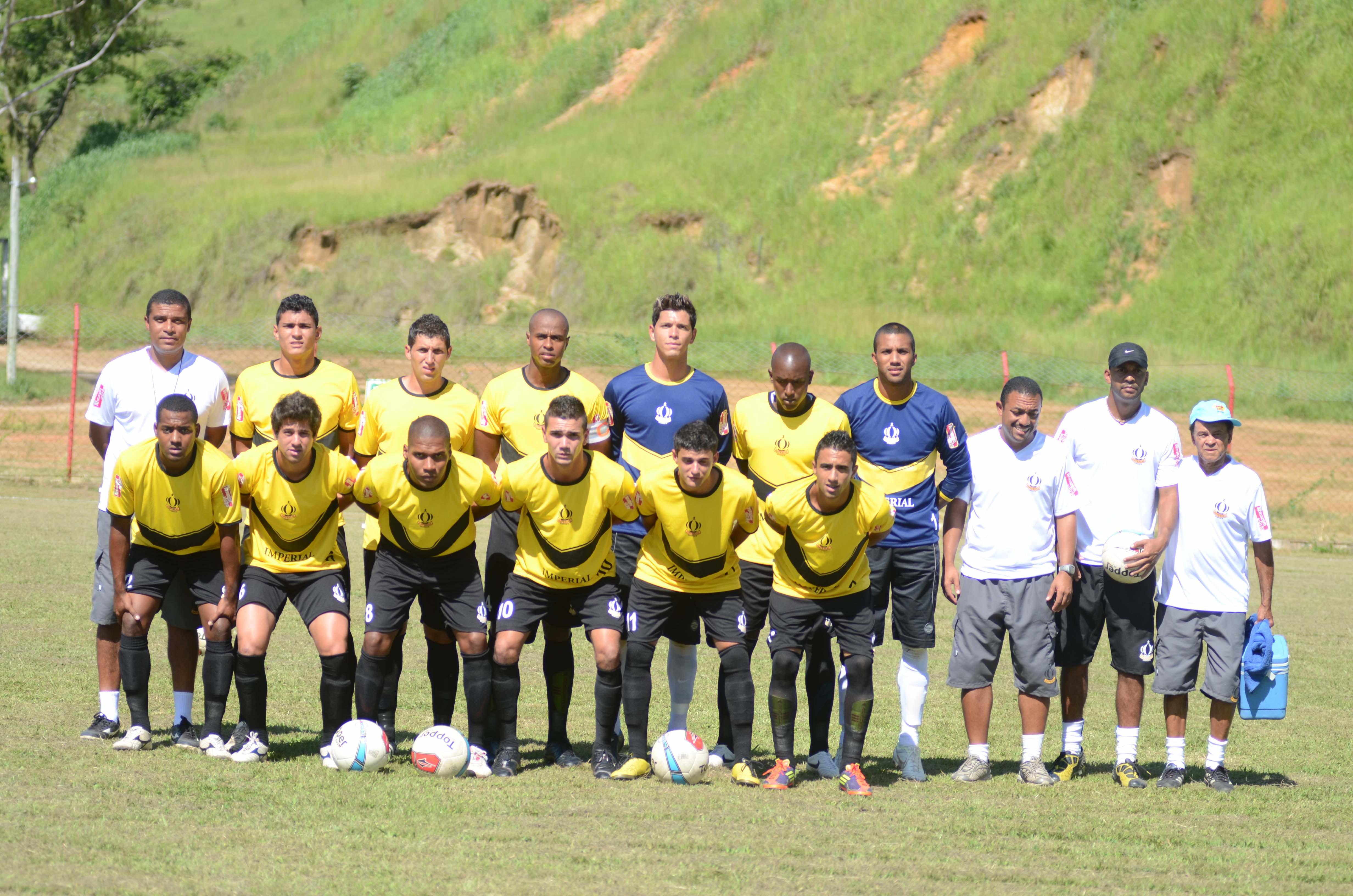 Equipe profissional do Imperial Futebol Clube na disputa da Série B do Rio de Janeiro em 2012